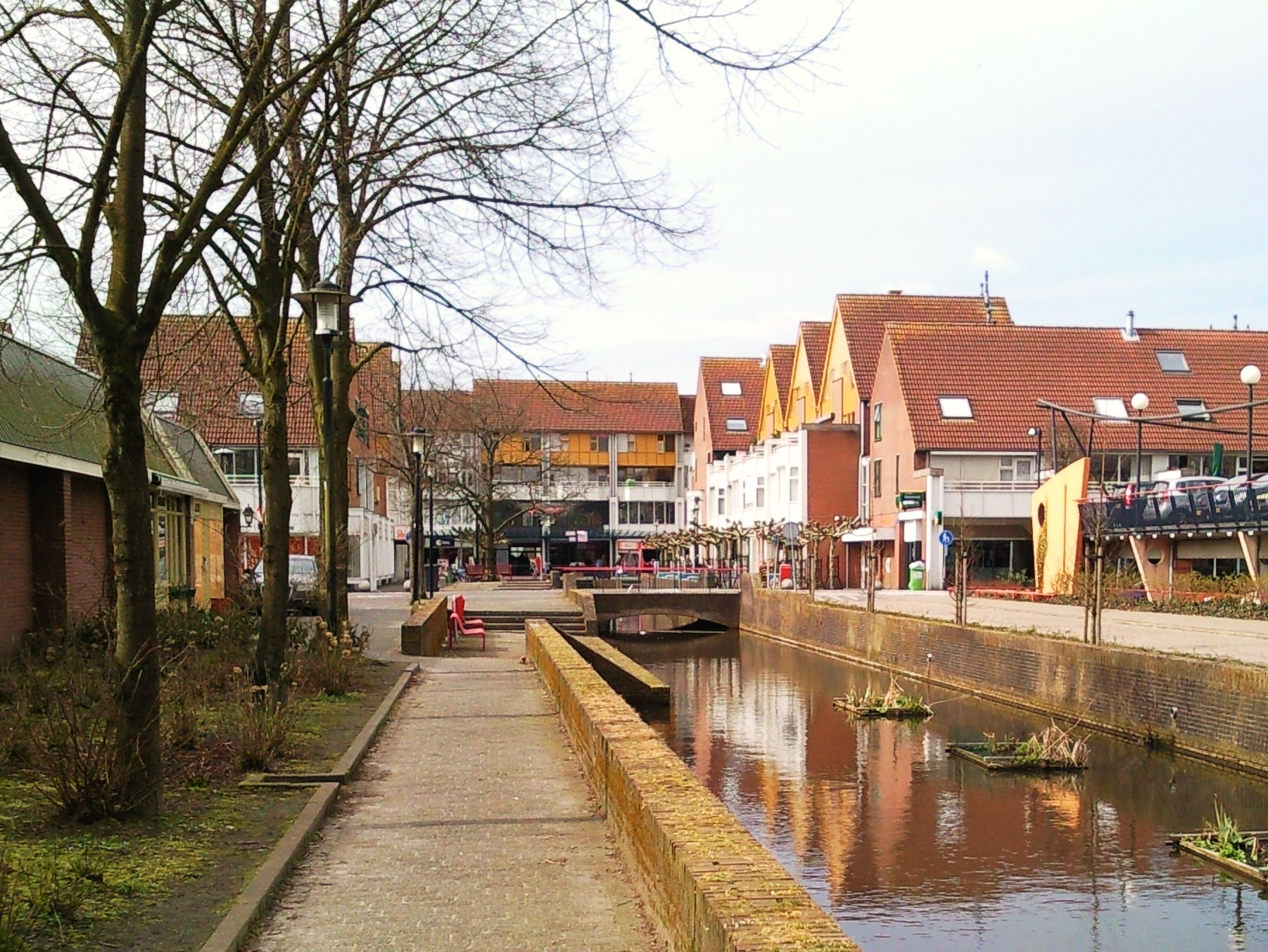 Het centrum van de stad, met de enige stadsgracht die ze bezit de Kooikersgracht.